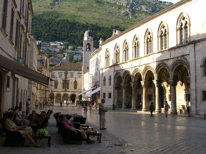 square in Dubrovnik